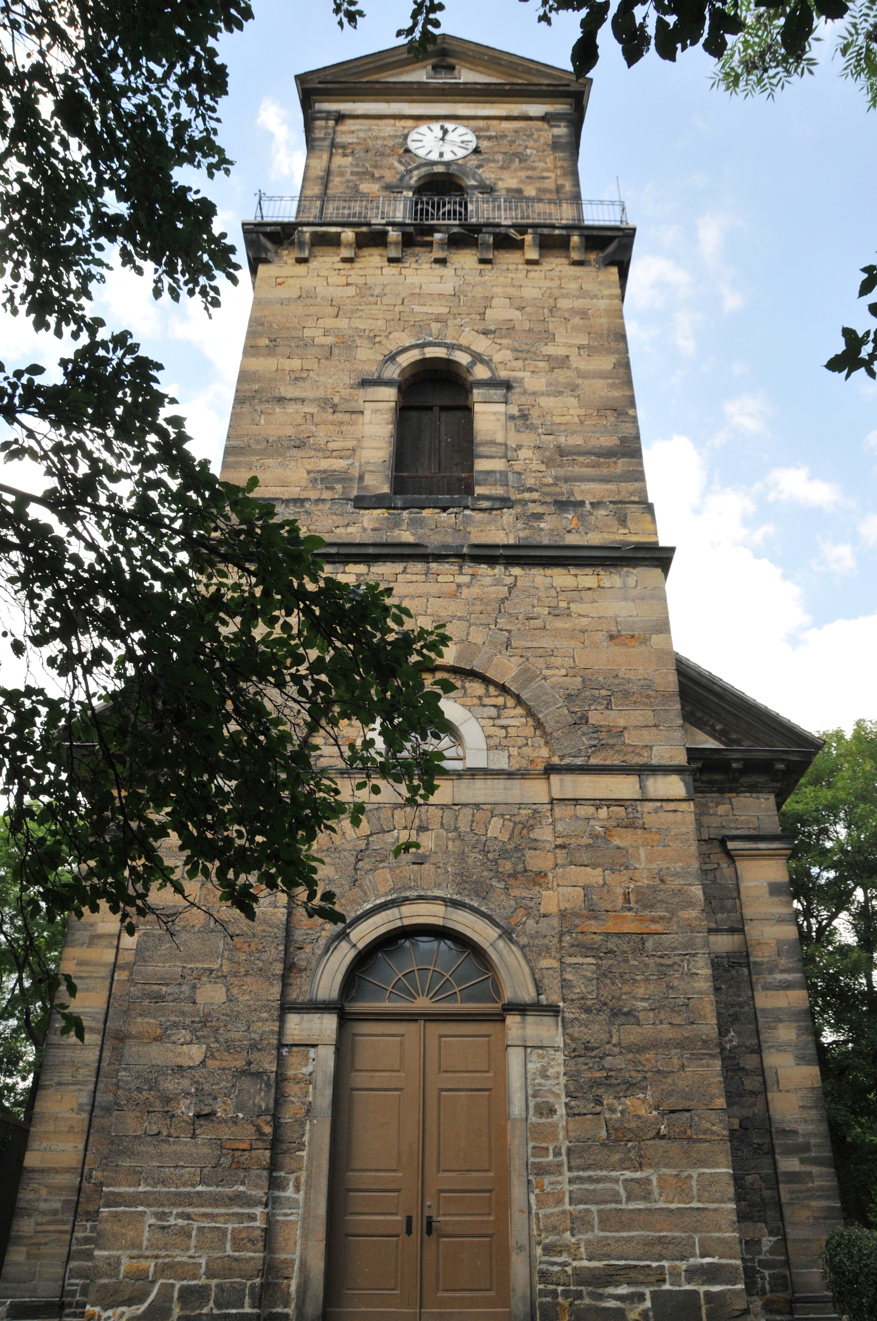 Siebleben, Kirchturm